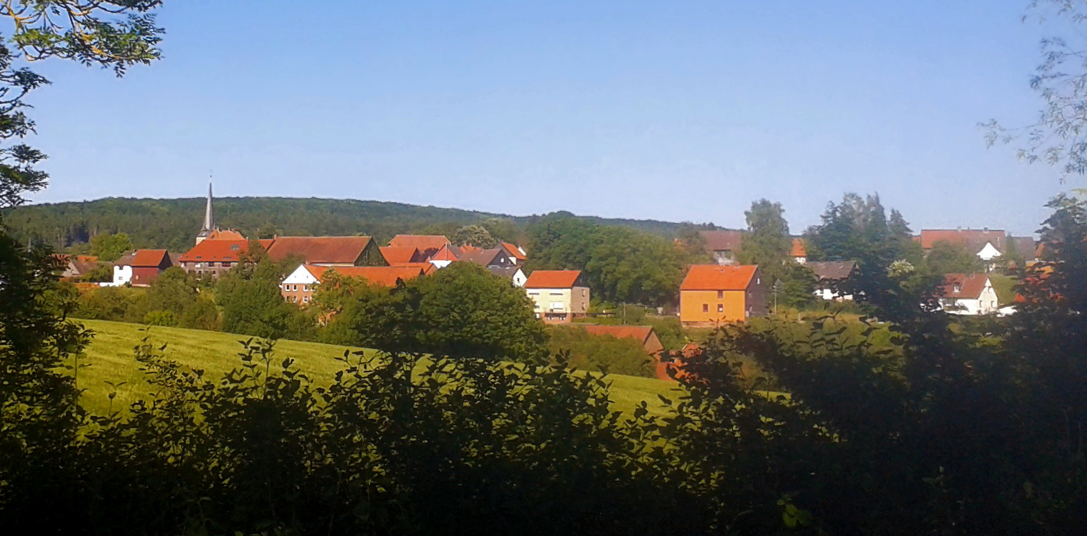 Blick auf die Bad Gandersheimer Ortschaft Gehrenrode von der alten Bahnstrecke Gandersheim-Bodenburg aus.